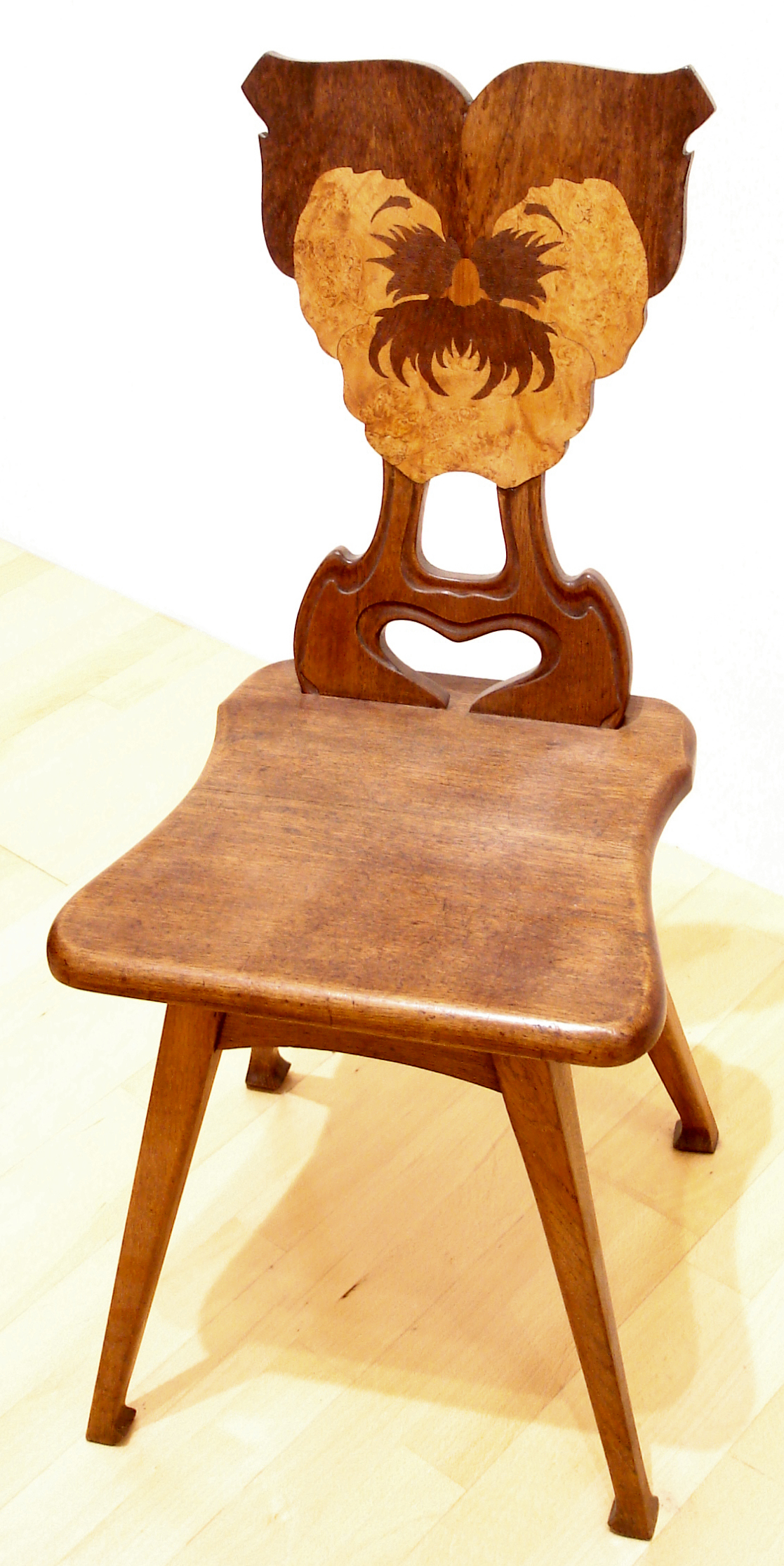 Chaise marquettée